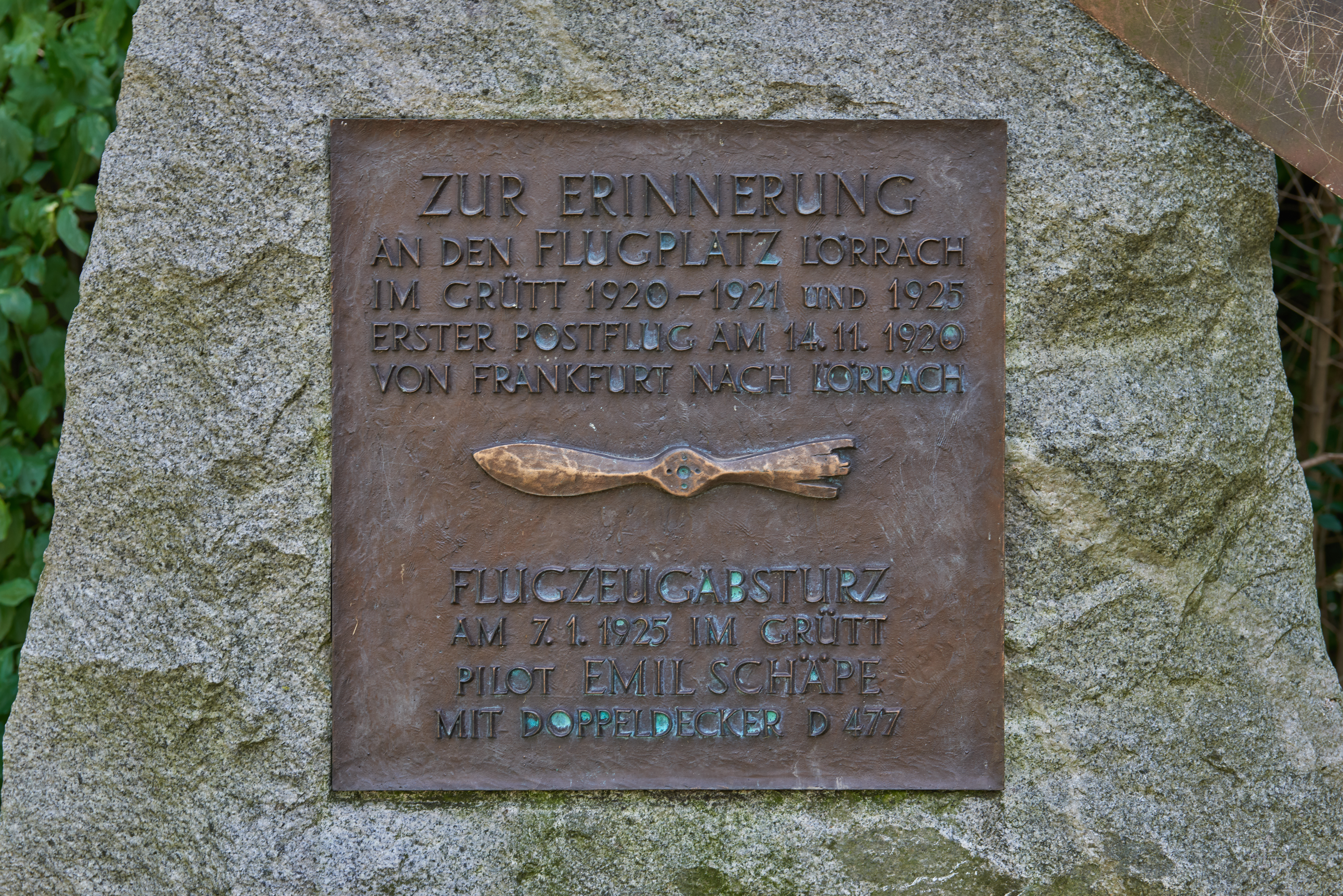 Fliegerdenkmal am Grüttpark